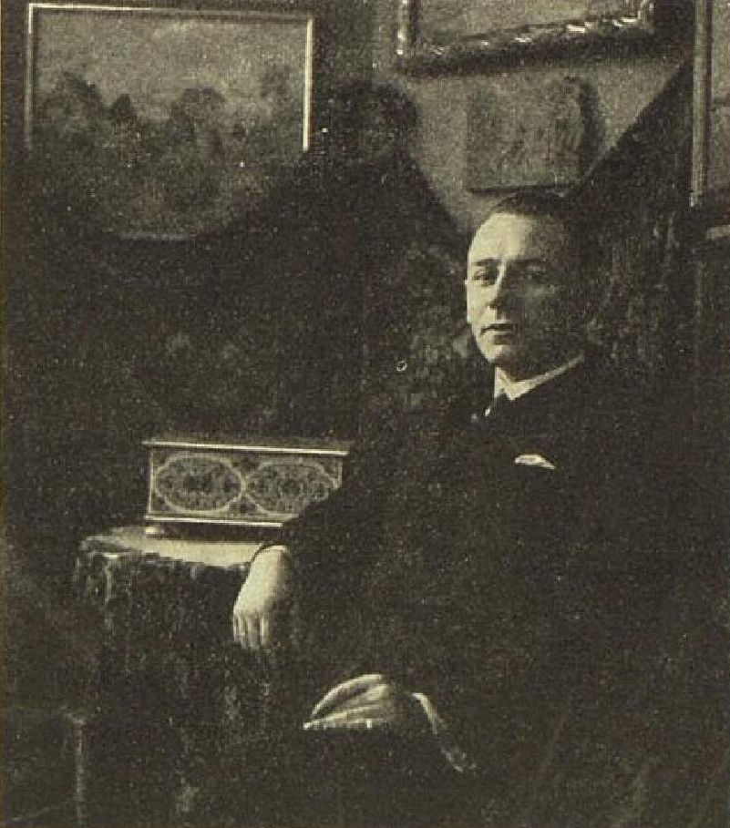 Gustav Macoun (1889-1934), český malíř-krajinář